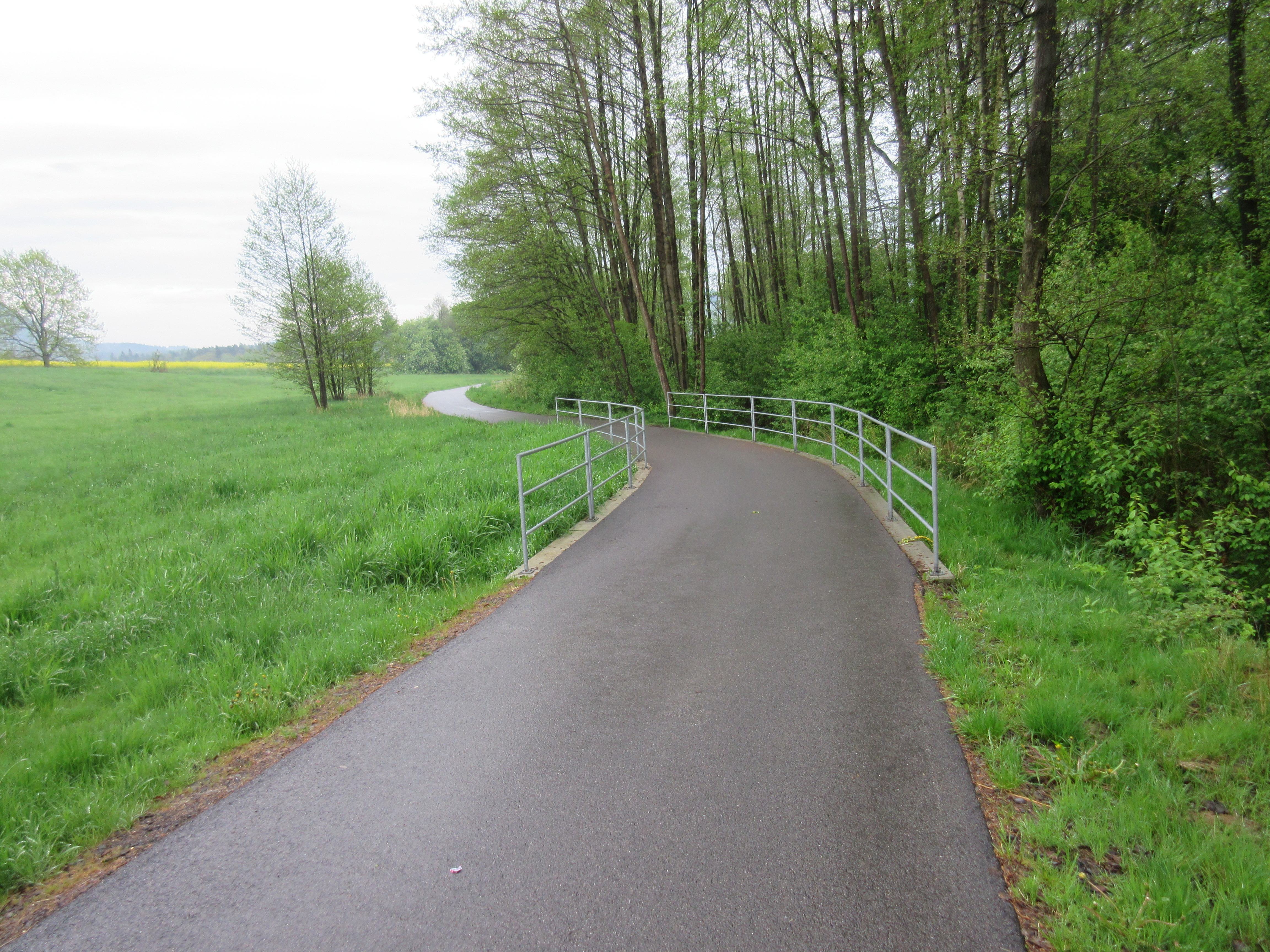 Cyklostezka se zde svažuje k Sloupu